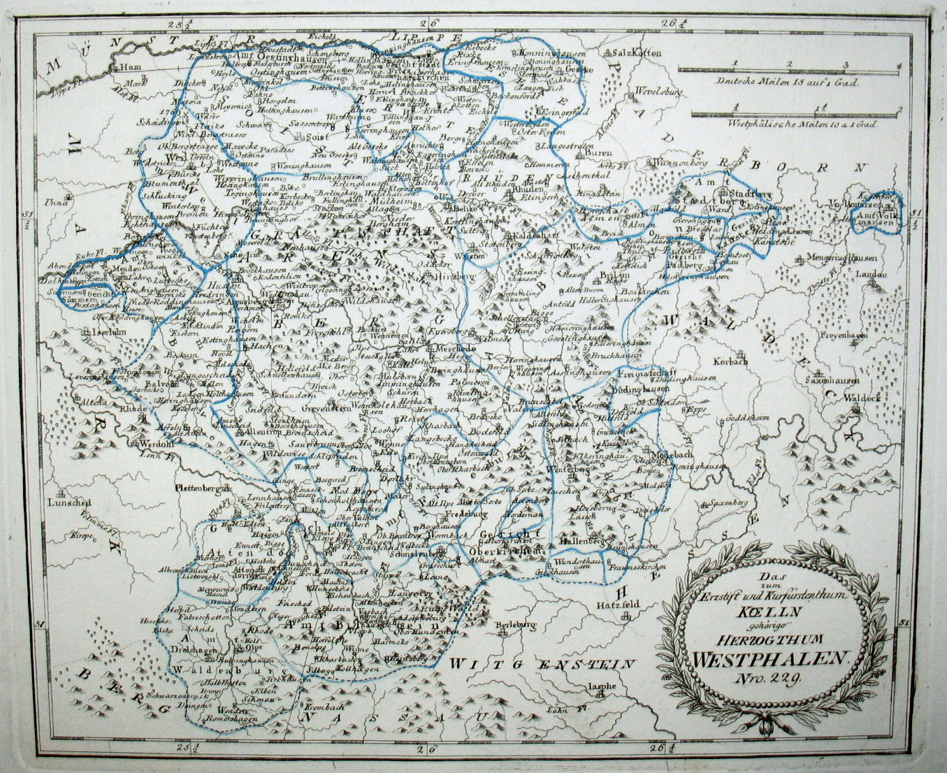 Das zum Erzstift und Kurfürstenthum Koelln gehörige Herzogthum Westphalen. Nro. 229. Kolorierter Kupferstich, Version mit größerer Ortsdichte